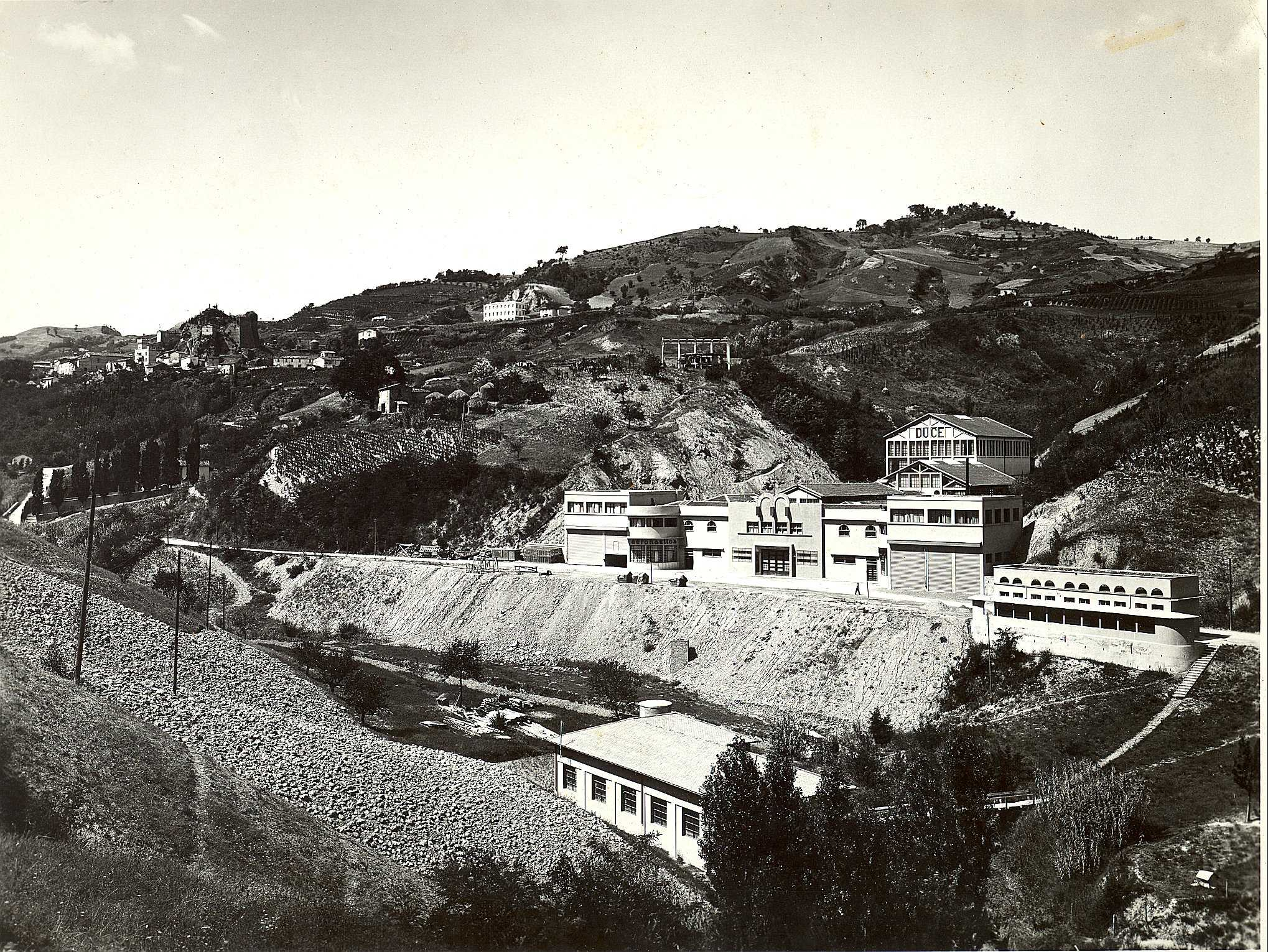 Lo stabilimento dell'Aeronautica Caproni di Predappio (Forlì) nel 1939 - veduta d'insieme